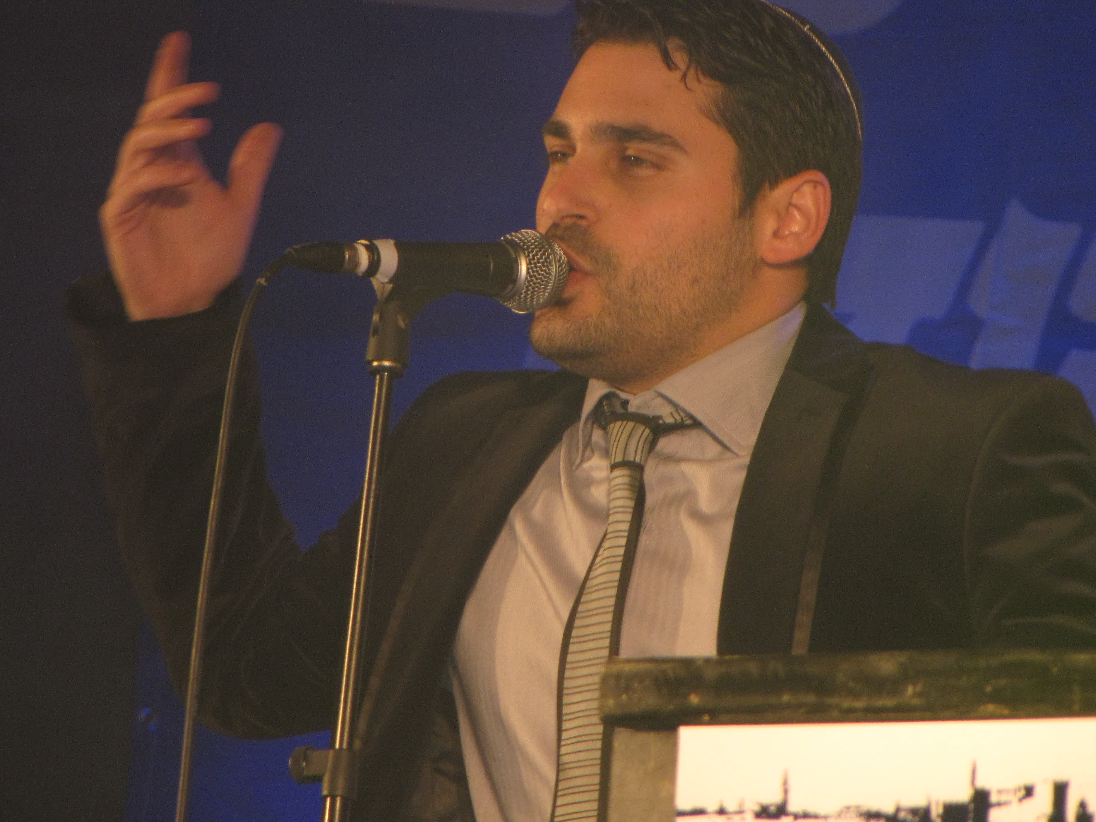 גד אלבז במפגן תמיכה ביו"ש בכיכר ציון בירושלים. ט"ז טבת התשע"א רישיון מותר להשתמש בשמחה בתמונה...! רק בבקשה לתת קרדיט לצלם התמונה - יהונתן חברוני. אשמח אם תודיעו על שימוש בתמונה במייל: The copyright holder of this file, יהונתן חברוני, allows anyone to use it for any purpose, provided that the copyright holder is properly attributed. Redistribution, derivative work, commercial use, and all other use is permitted. Attribution: יהונתן חברוני